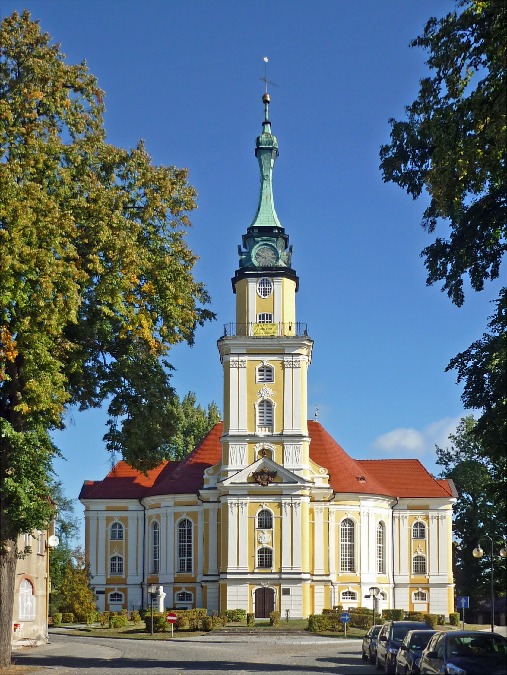 Evangelische Kirche von Bad Carlsruhe/Pokój in Schlesien